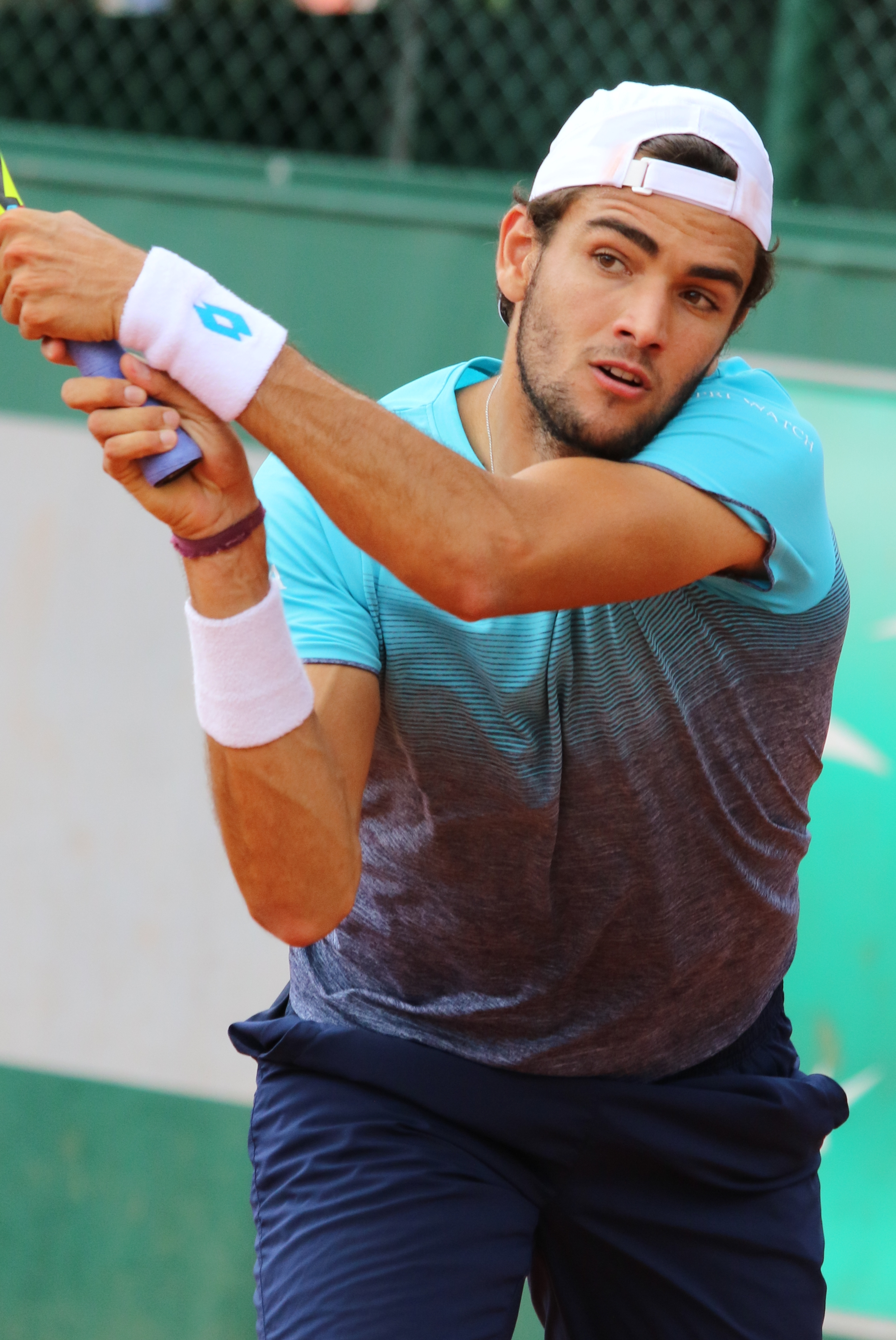 Berrettini RG18 (38)